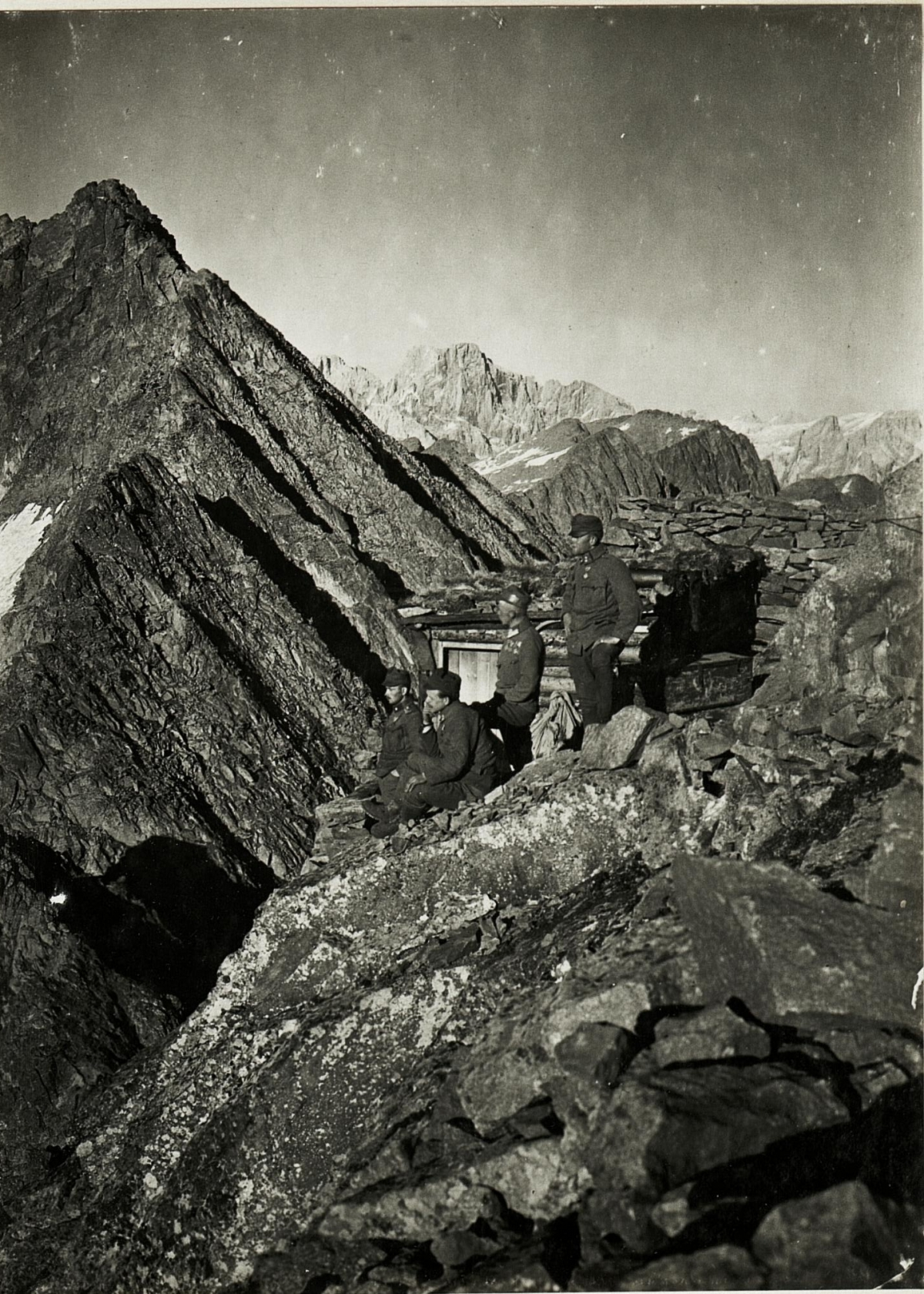 Standpunkt Kleine Cece Gipfel Feldwache: Große Cece und Colbricon.